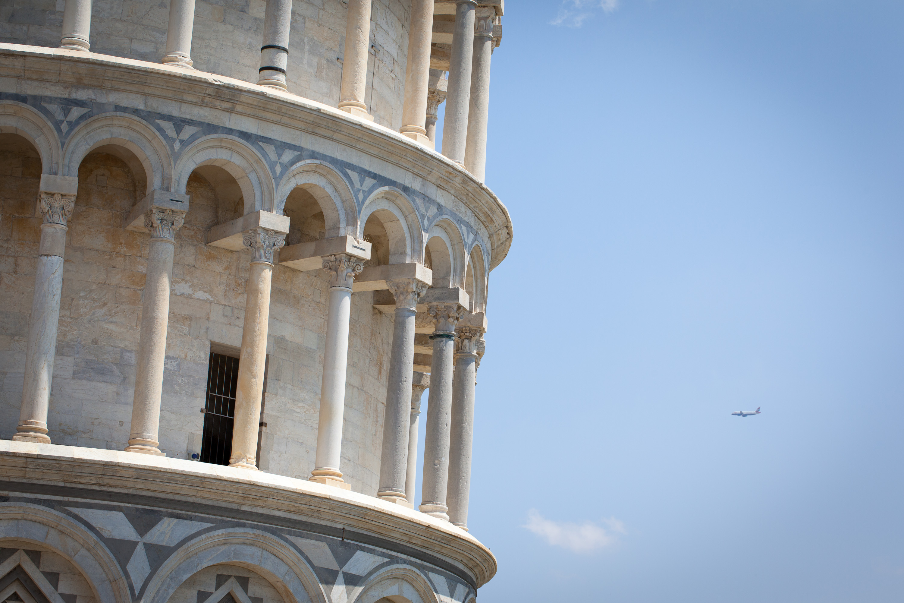 Pisa